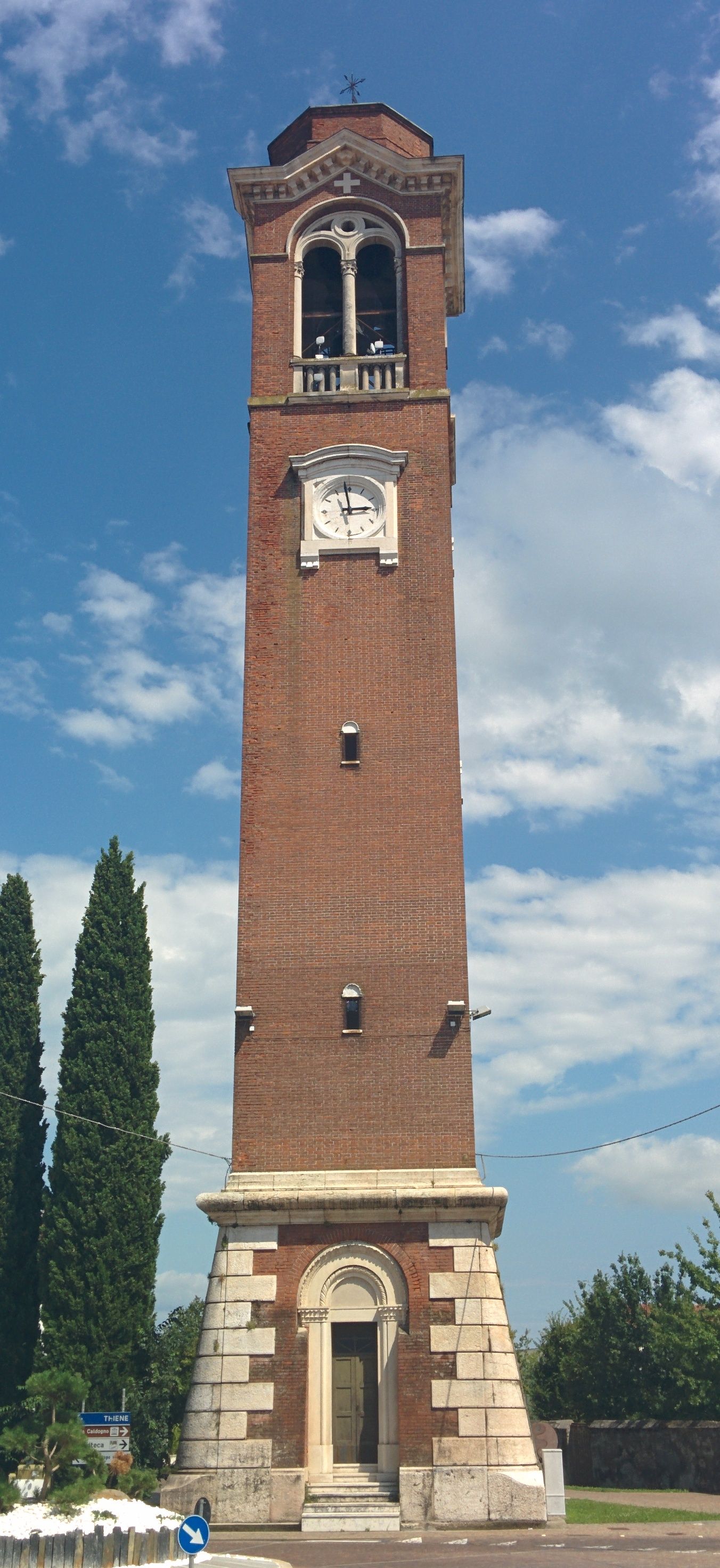 Campanile della chiesa parrocchiale di Caldogno, in provincia di Vicenza.